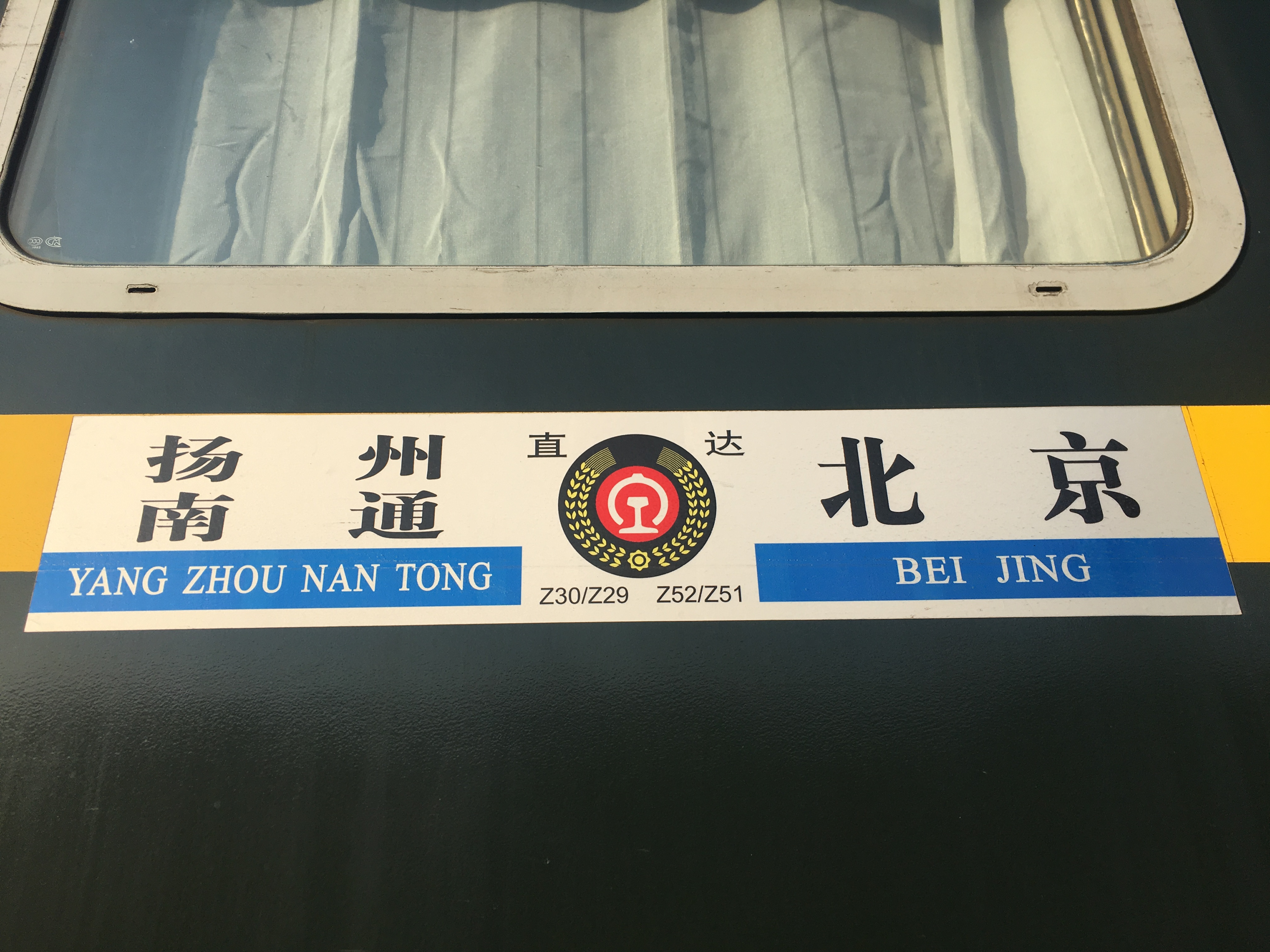 2017.11水牌